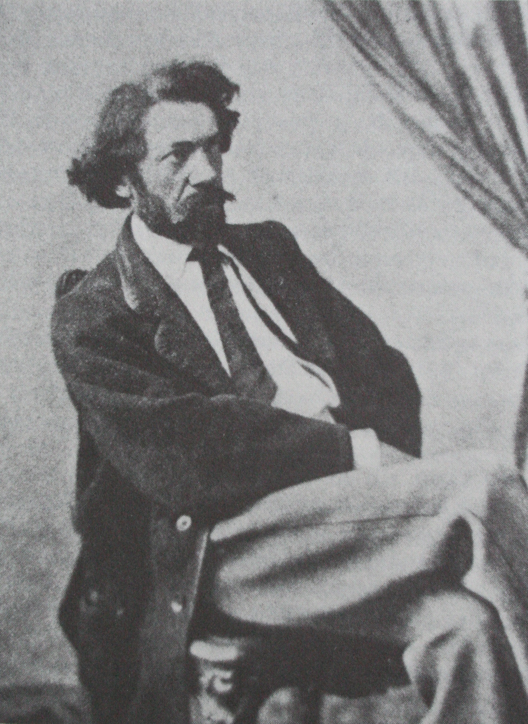 Der Schweizer Maler Albert Anker1855 in Paris